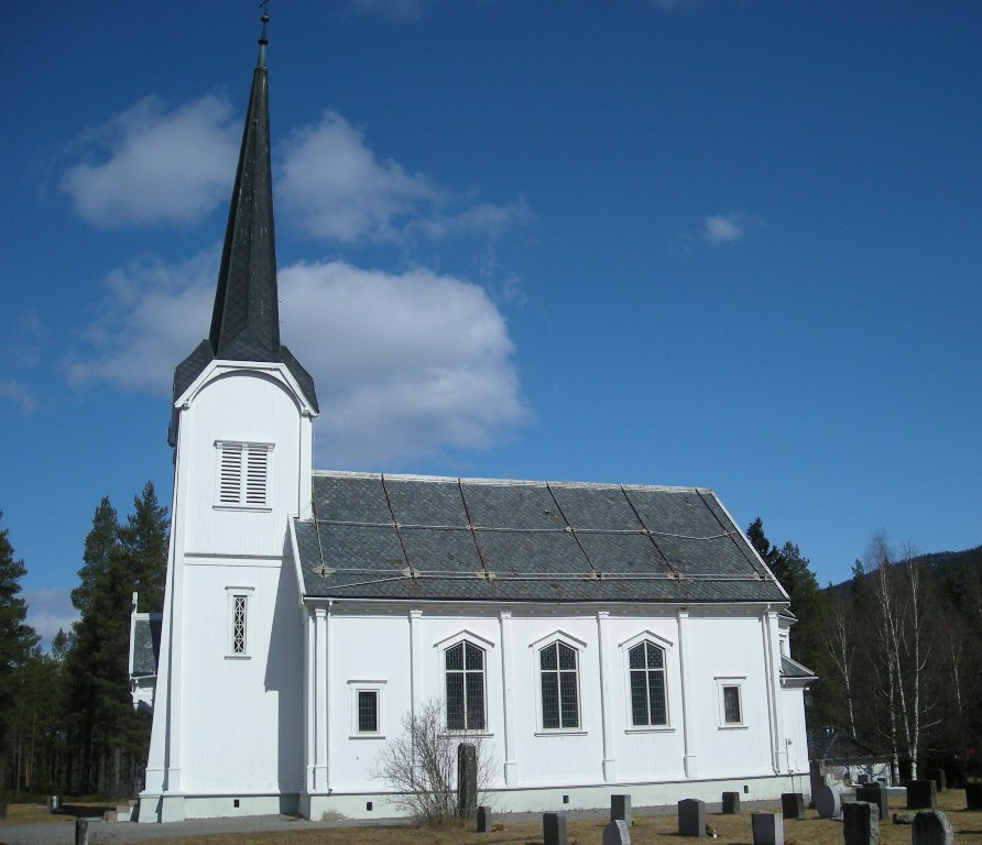 Deset kirke (Åmot kommune)